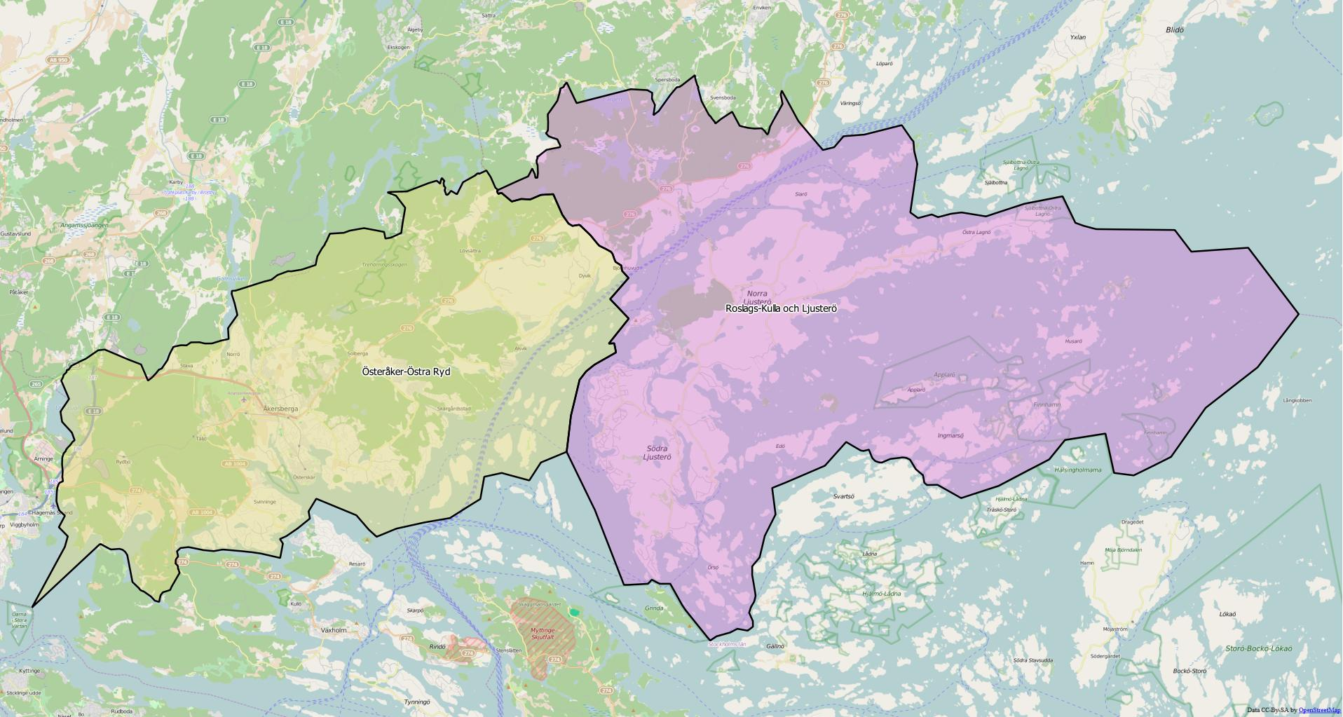 Distriktsindelningen i Österåkers kommun World file 54.25546631763109673 0 0 -54.25546631763109673 2014793.20360786095261574 8316989.66511119157075882